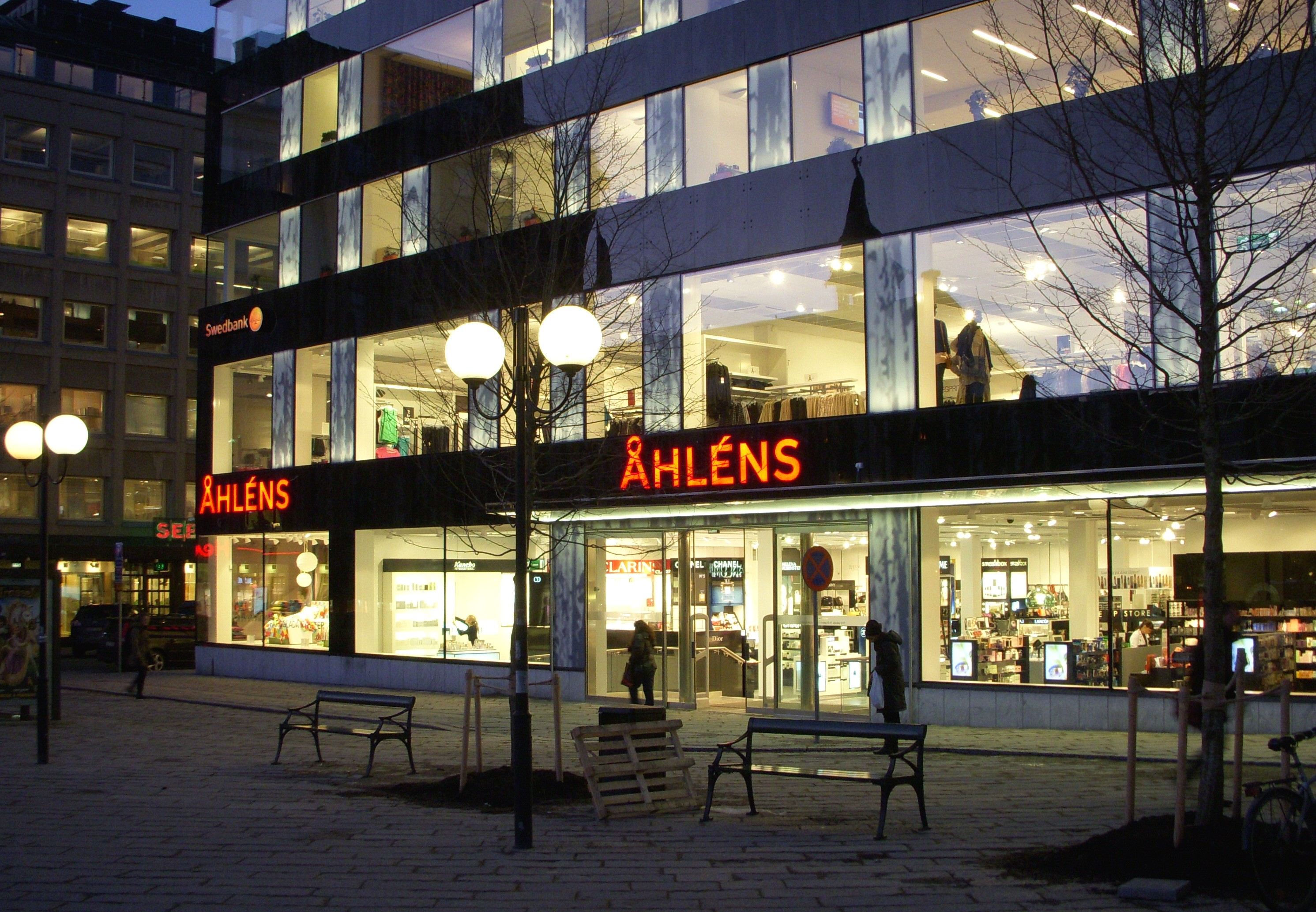 Åhléns Östermalmstorg